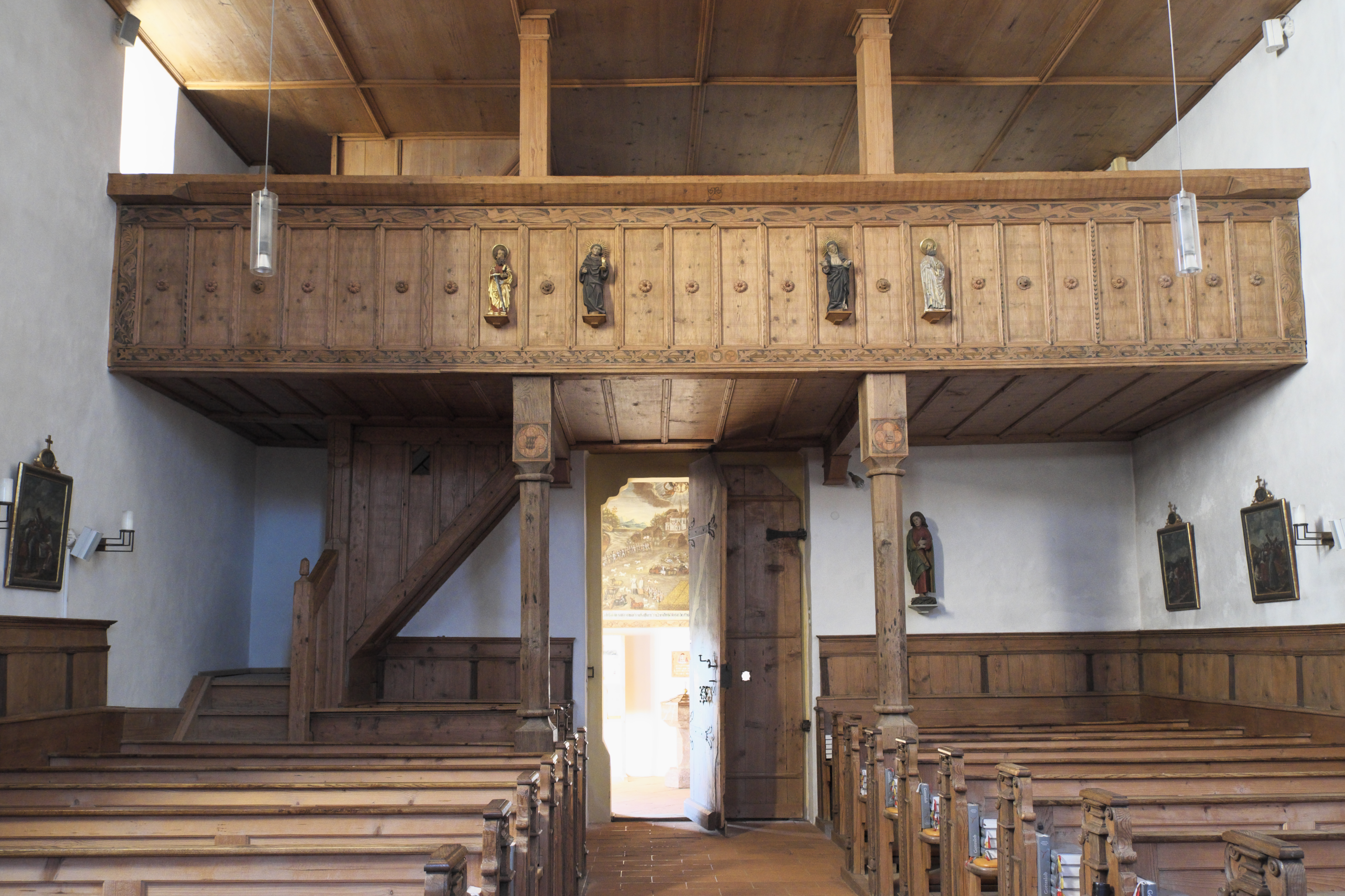 Heilig-Kreuz-Kirche in Schaftlach (Waakirchen) im Landkreis Miesbach (Bayern/Deutschland), Empore